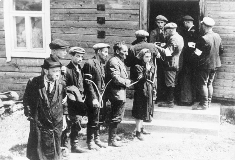 ADN-ZB-Archiv II. Weltkrieg 1939 -1945 An der Ostfront im Juli 1941 Nach der Besetzung der Litauischen SSR werden die Juden von der litauischen Heimwehr, die mit den deutschen Faschisten kollaborieren, sofort zu "Sonderbehandlung" zusammengetrieben. 6917-41